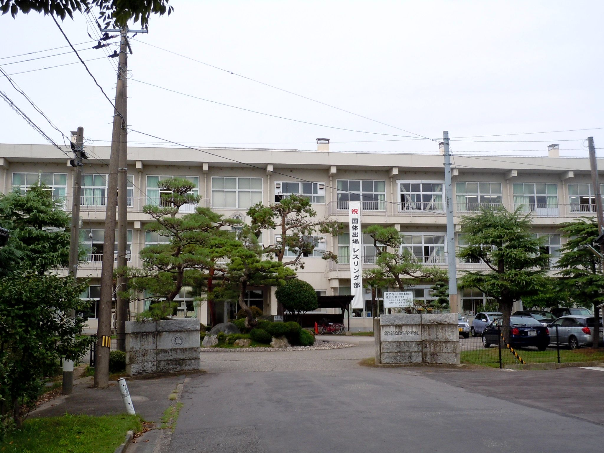 新潟県立白根高等学校